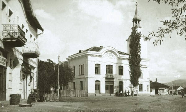 Народно читалище „Христо Ботев 1884“, Ботевград в миналото